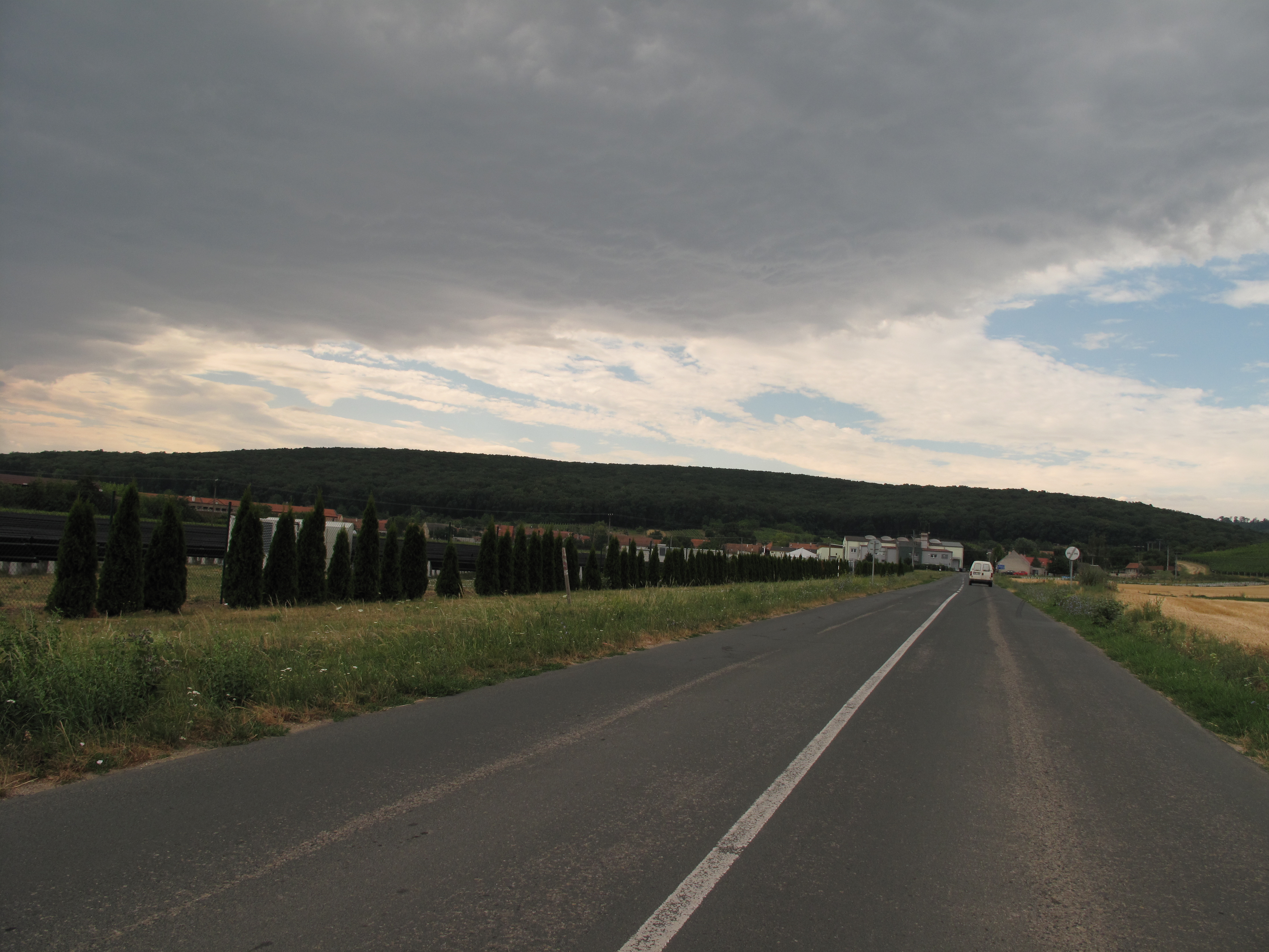 Nature reserve Milovická stráň. Okres Břeclav, Česká republika.